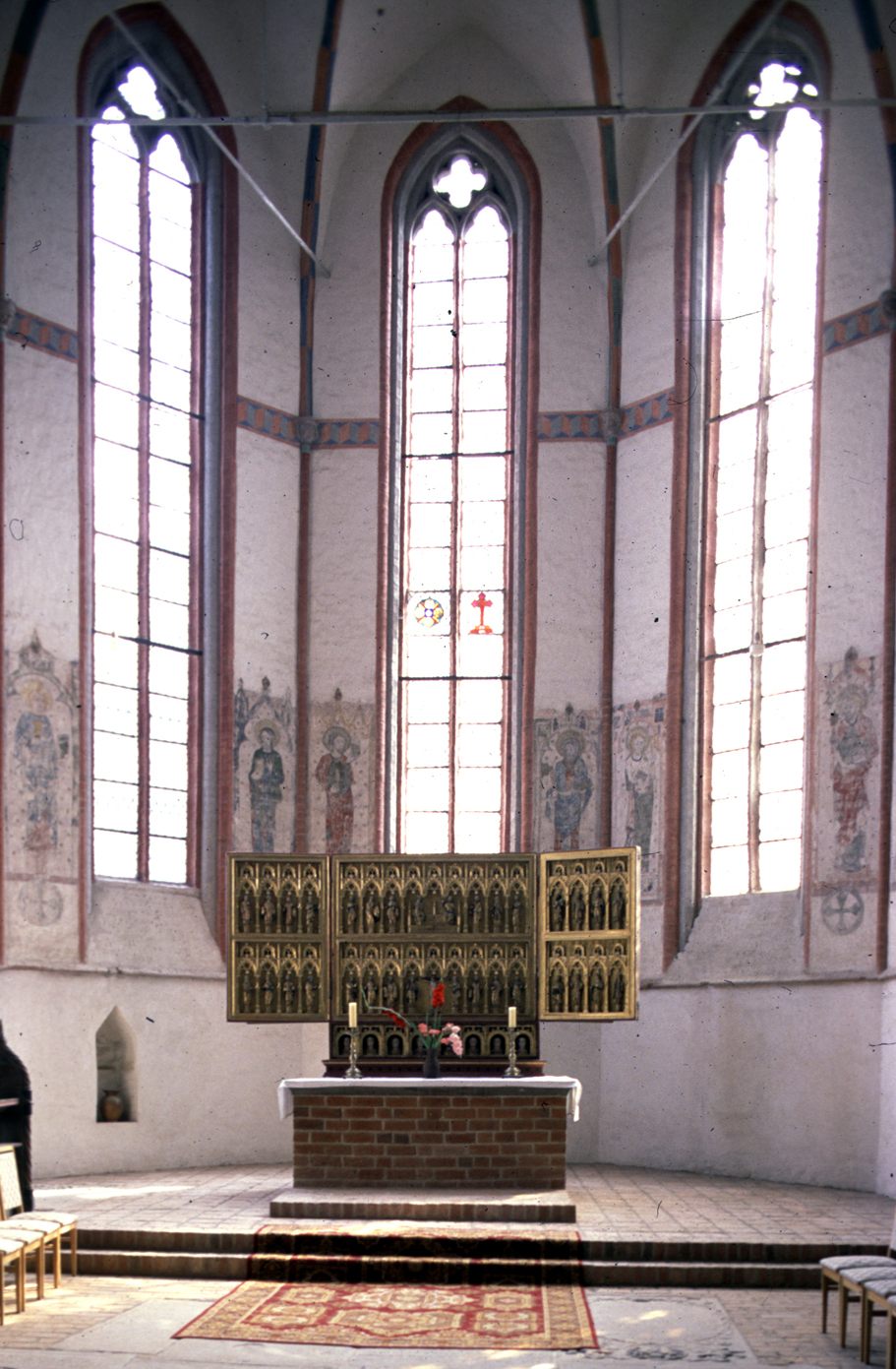 Beschreibung: Altarraum der Marienkirche (Gardelegen, Altmark, Sachsen-Anhalt) Quelle:eigenes Dia Datum:02.Feb.2007 Autor:Hein_Elpers